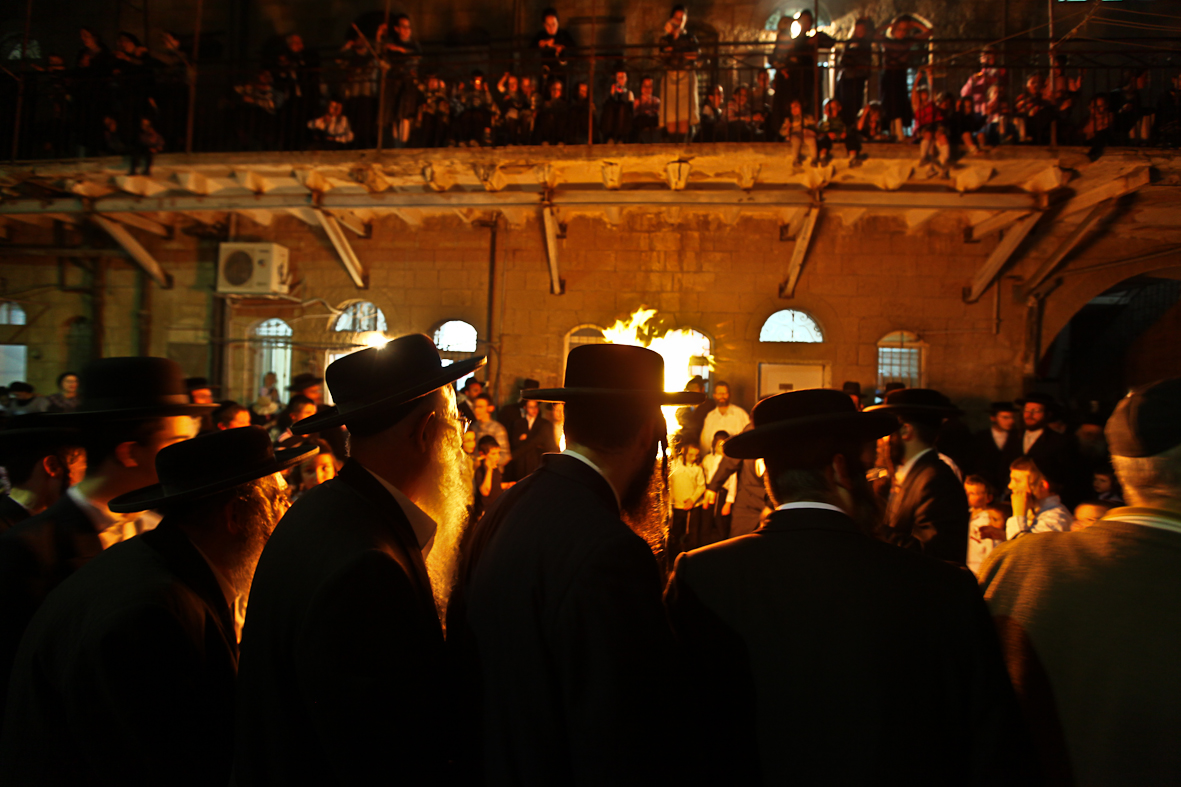 בתי ראנד היא שכונת חצר בירושלים, בין רחוב בצלאל לבין שכונת מחנה יהודה. נקראת על שם מייסדה, מנחם מנדל הכהן ראנד. בשכונה בתים שיתופיים בני שתי קומות, עם אלמנטים פיסוליים רבים, הבנויים מסביב לחצרות פנימיות.